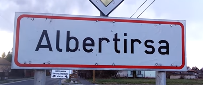 Ortsschild